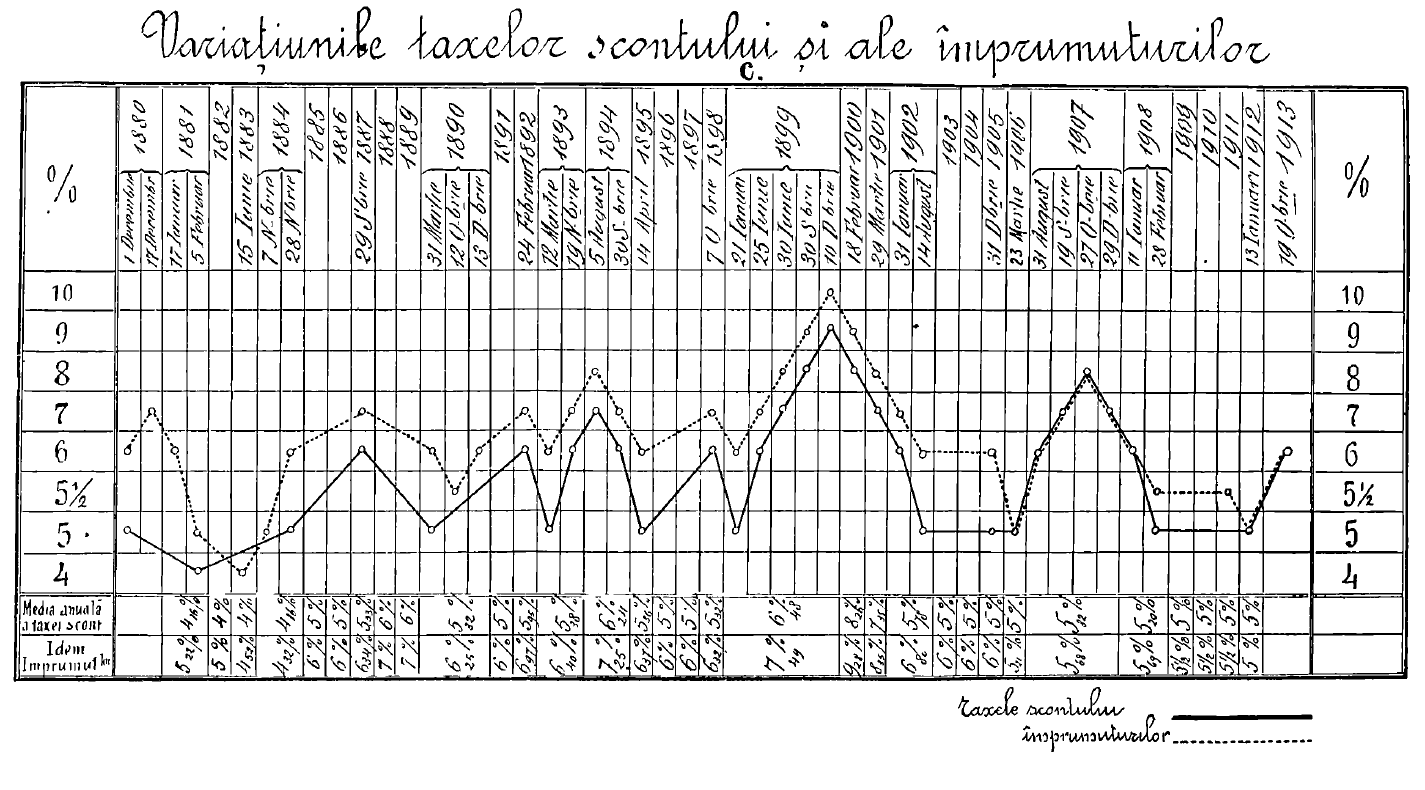 Graficul variatiei taxei de scont şi împrumuturilor in România - 1886-1912